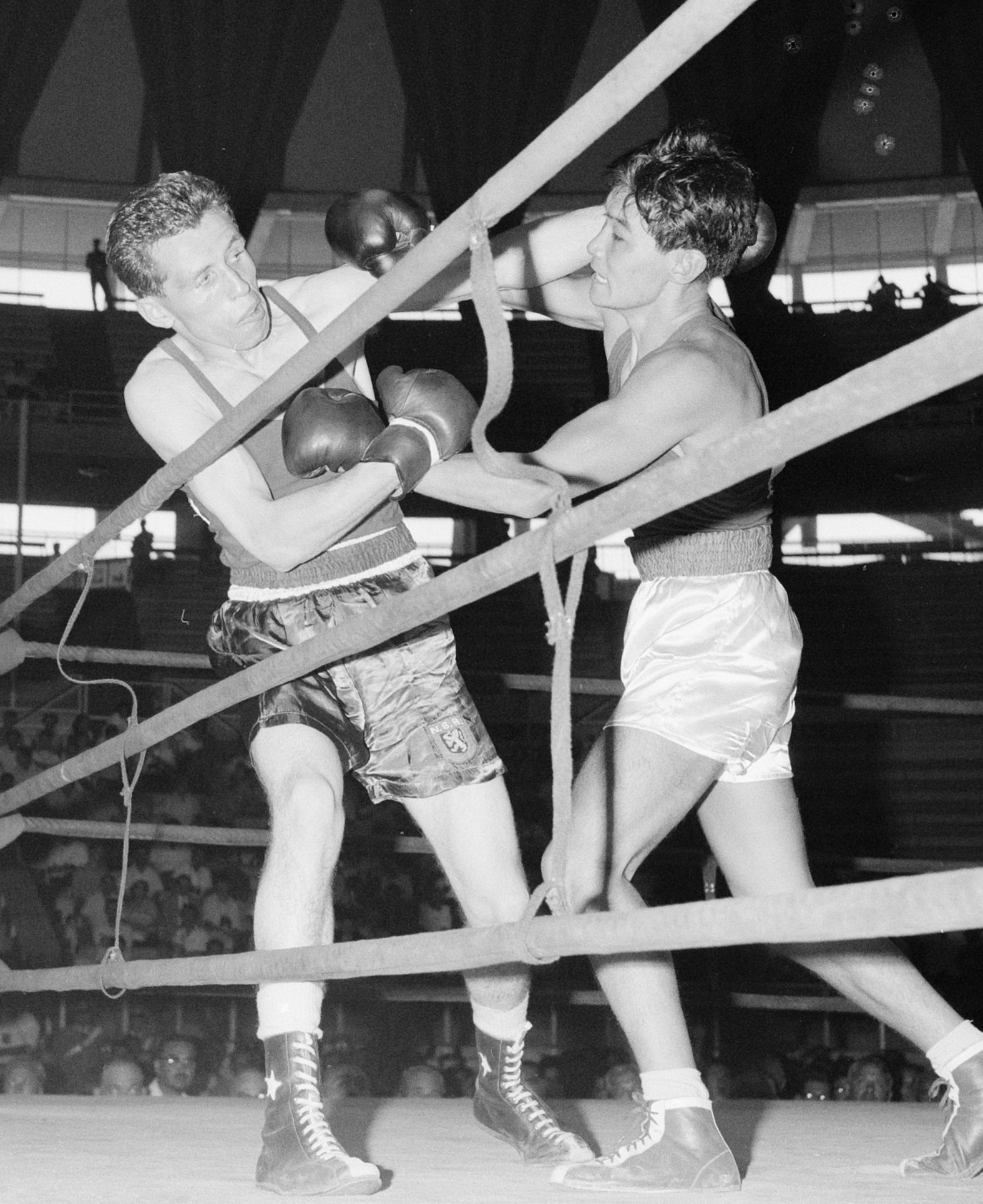 Olympische Spelen te Rome, boksen Gerlach tegen Barannikov